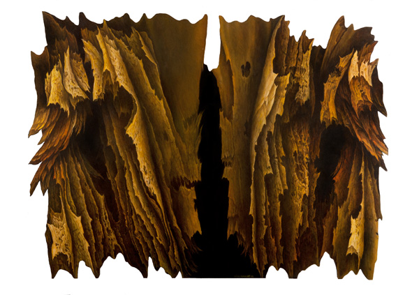 Antoni Kowalski, Drzewo żywota-wrota I, olej, 103x140 cm, płyta, 2014 Antoni Kowalski, Tree of life - gate I, oil canvas, 103x140 cm, 2014 Antoni Kowalski, Le bois de la vie – la porte, huile, toile, 103x140 cm, 2014